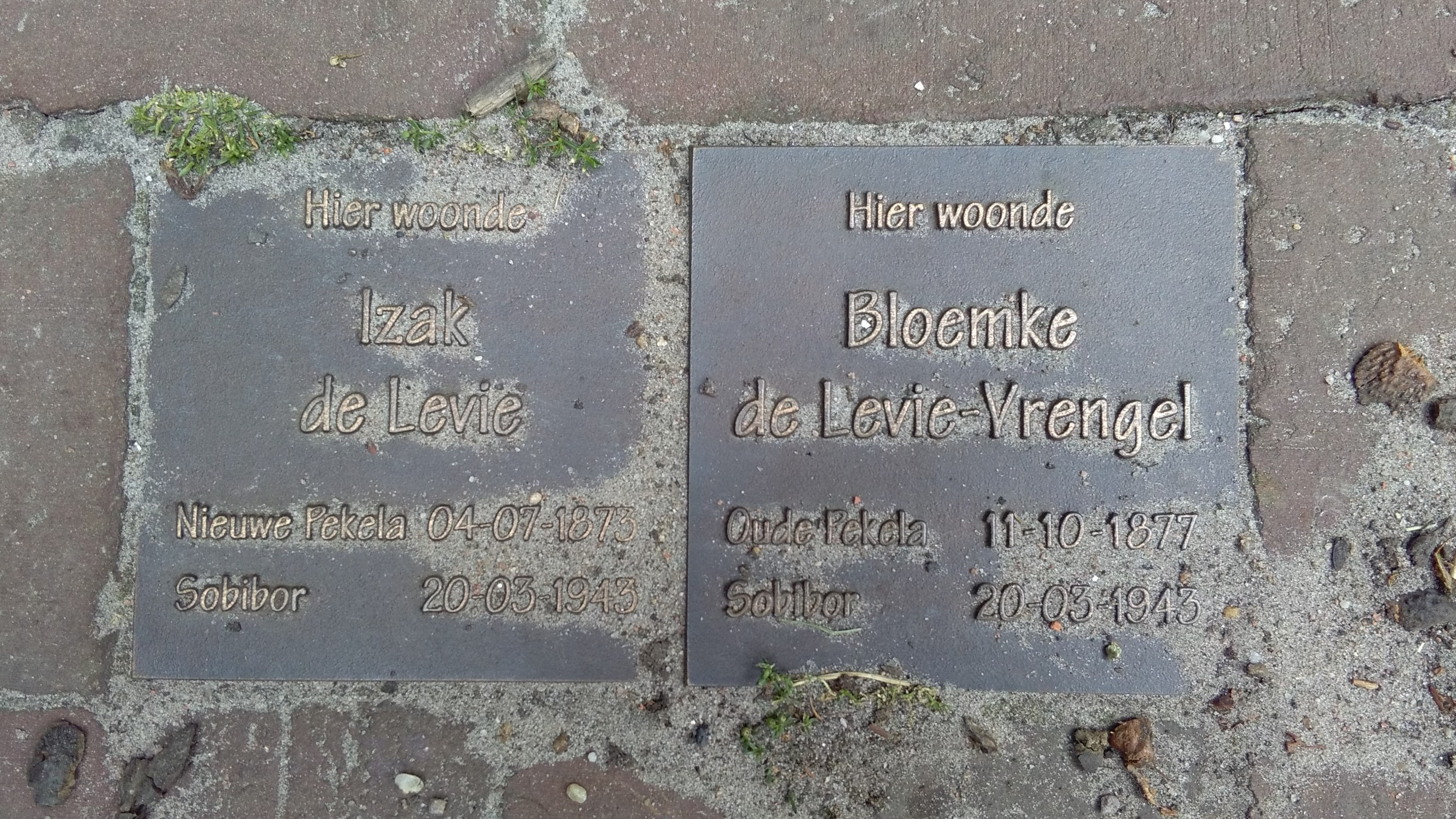 Twee struikelstenen voor de familie De Levi voor Hoofdweg 170 in Bellingwolde.